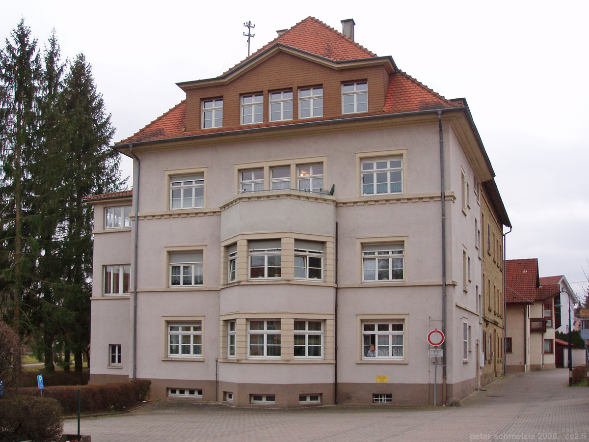 Mühle in Sinsheim-Steinsfurt, nachgewiesen seit dem 16. Jhd., in der heutigen Form aus dem frühen 20. Jhd.